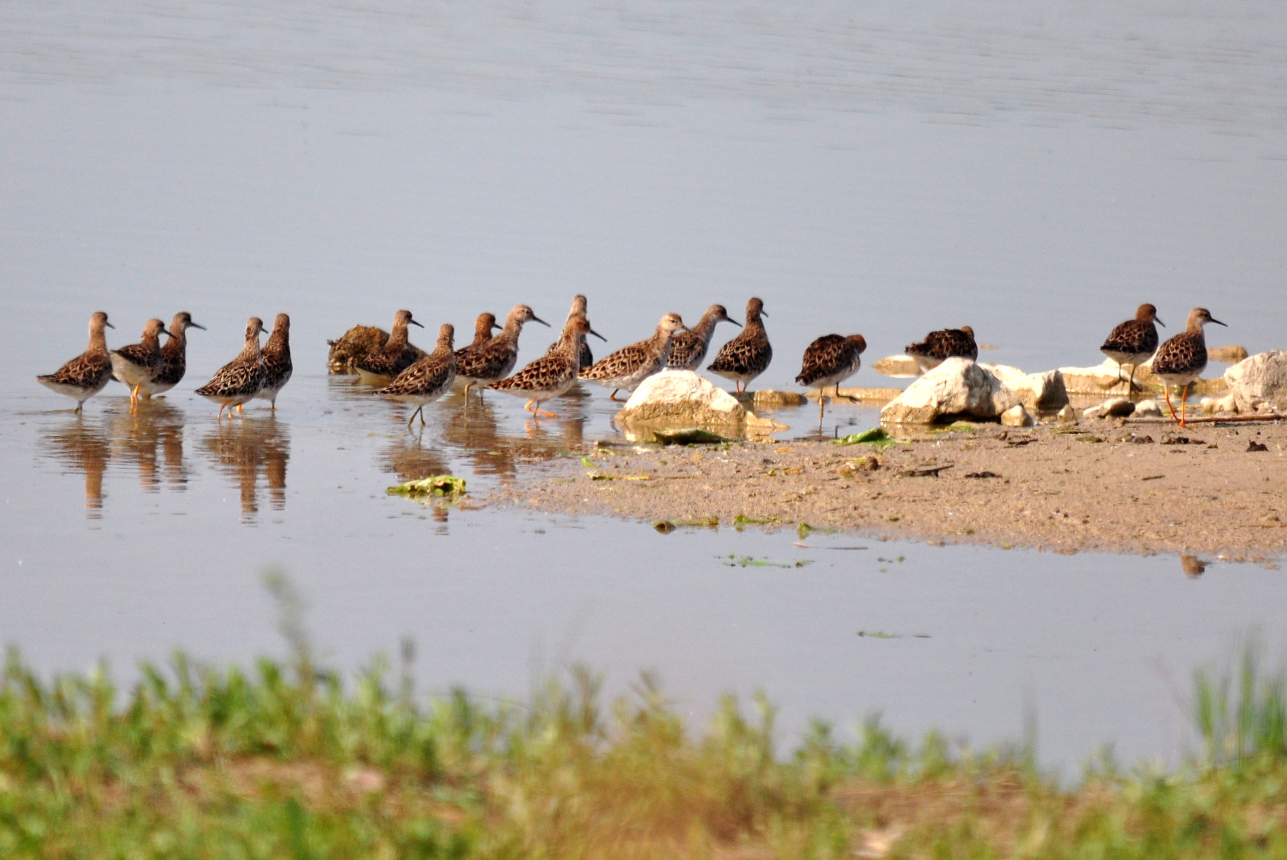 Kampfläufer (Philomachus pugnax) auf einer Sandbank im Naturschutzgebiet Herrschinger Moos.